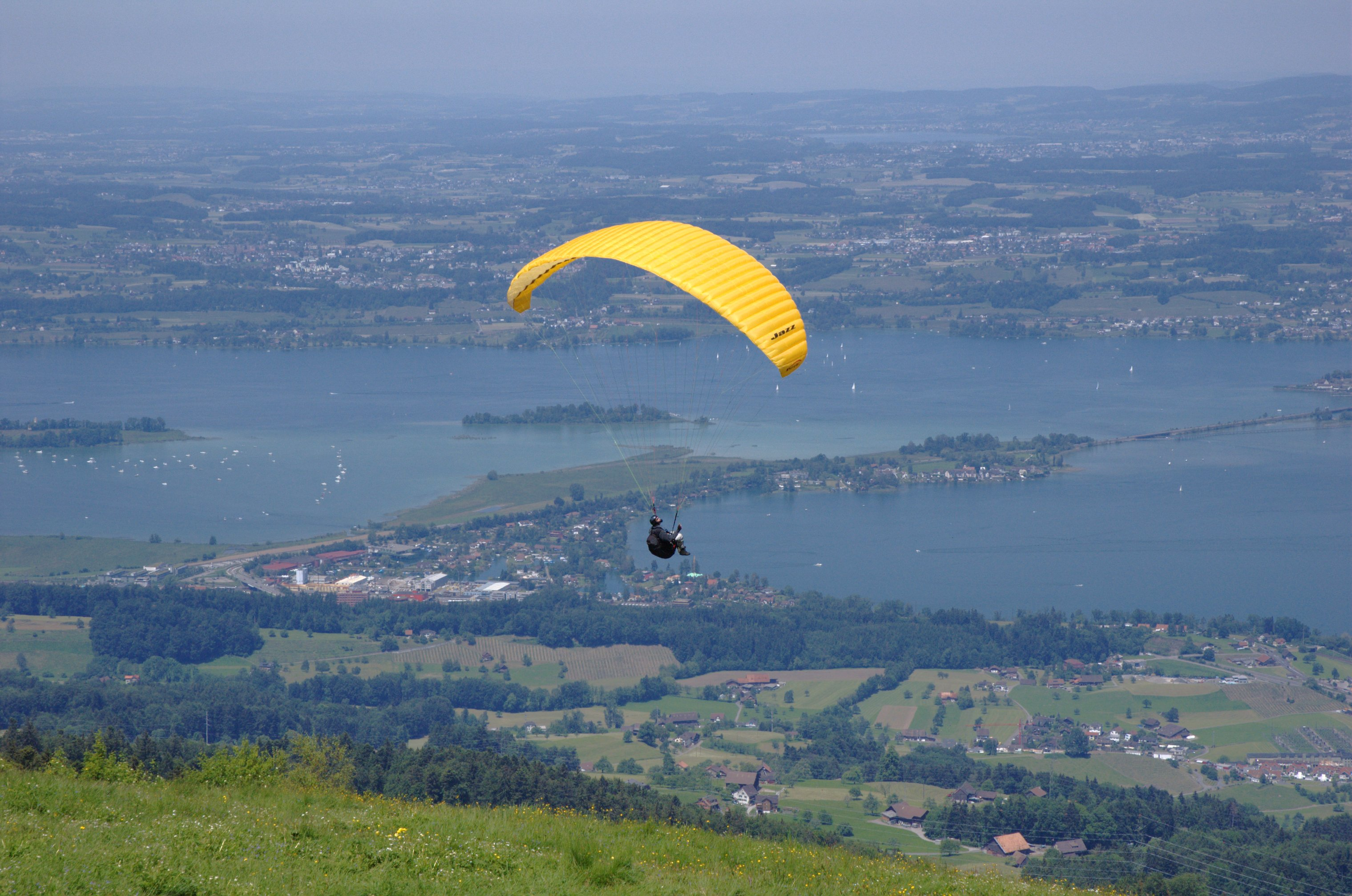 Paraglider: Pro-Design Jazz - ? Stöcklichrüz 1246 m !